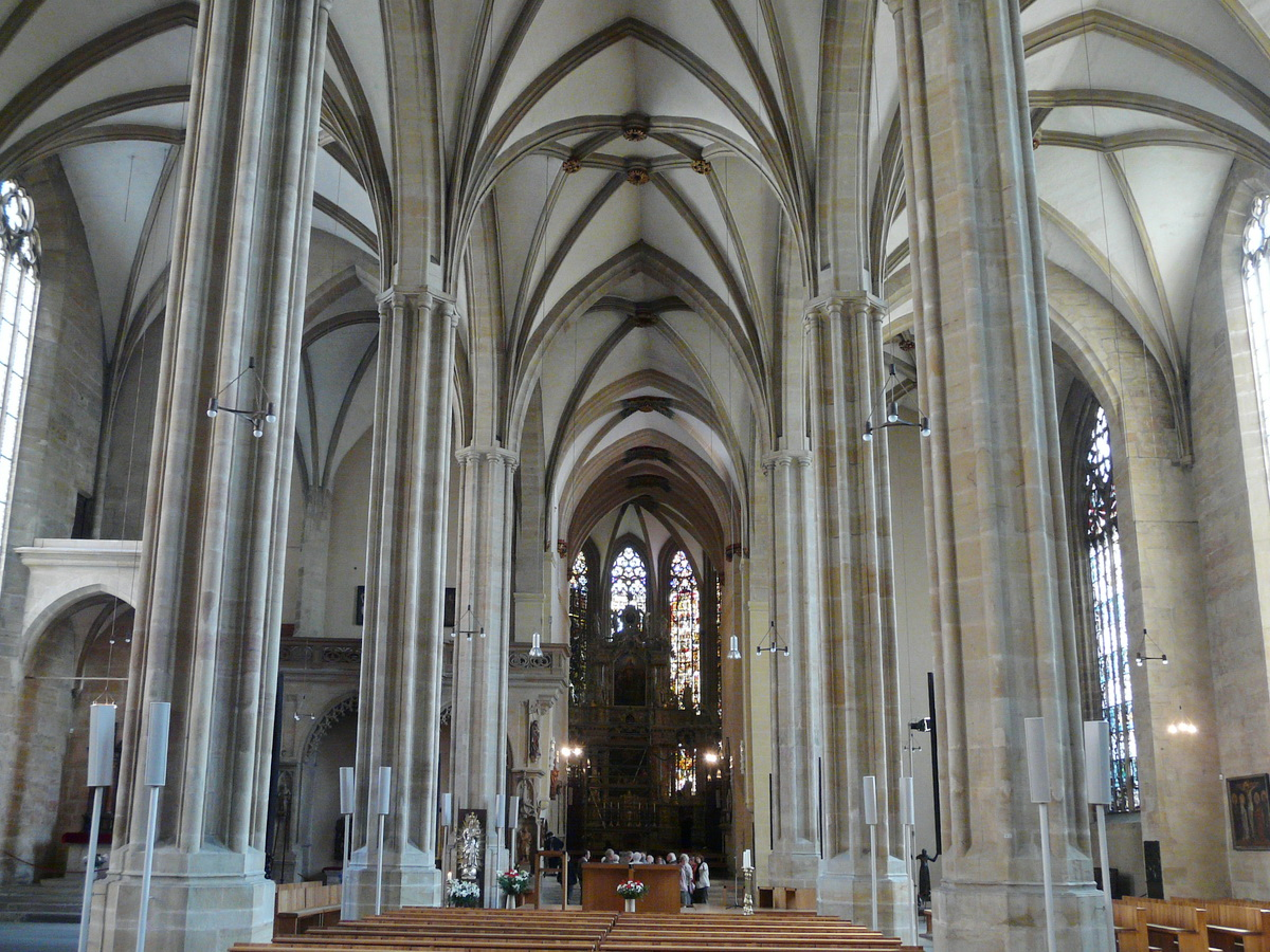 Erfurter Dom, Erfurt, Germany